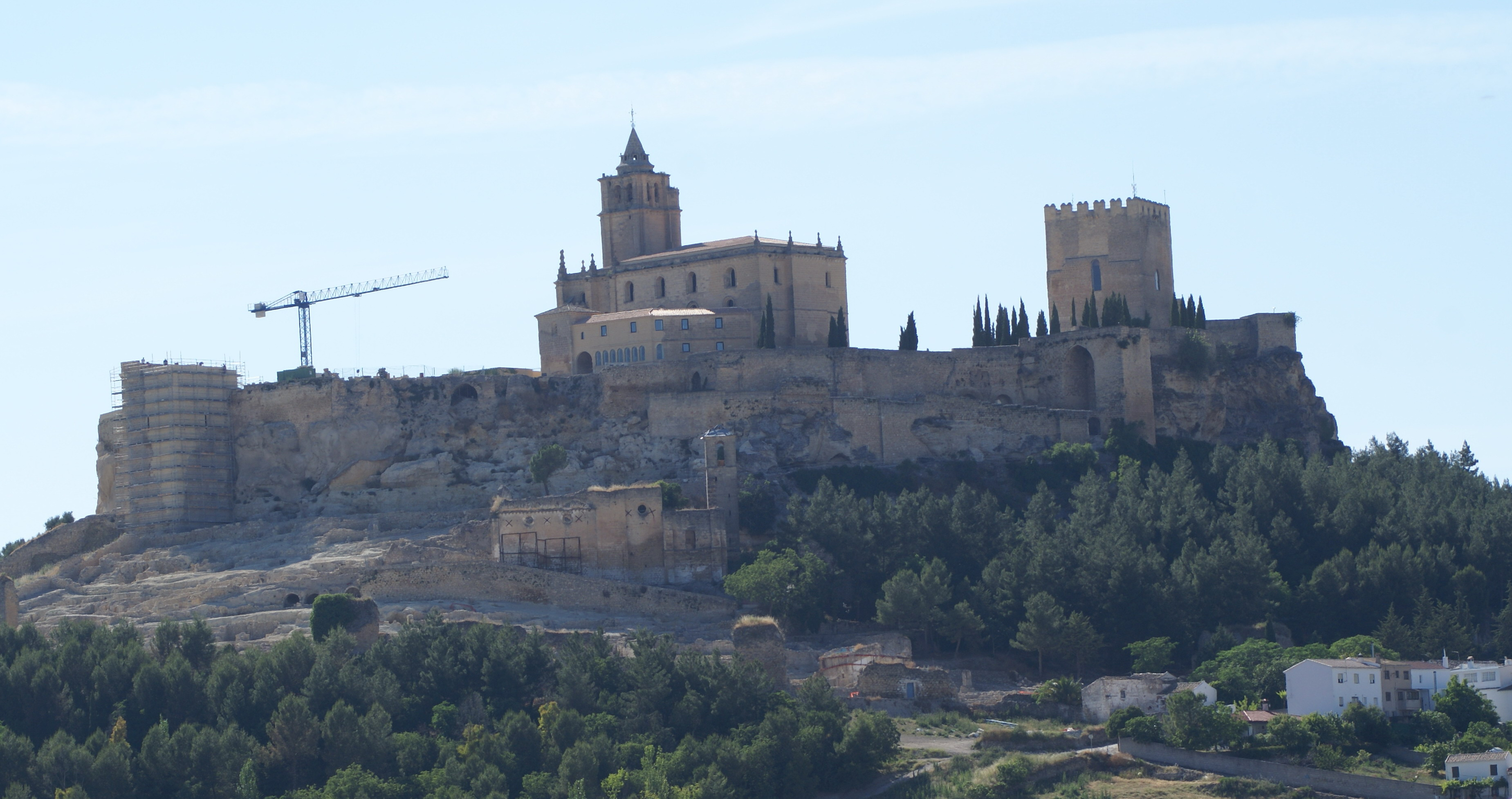 Fortaleza de la Mota en Alcalá la Real, Jaen, España